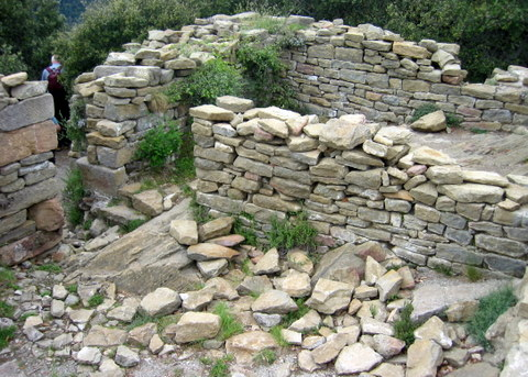 castell Colltort - Catalunya